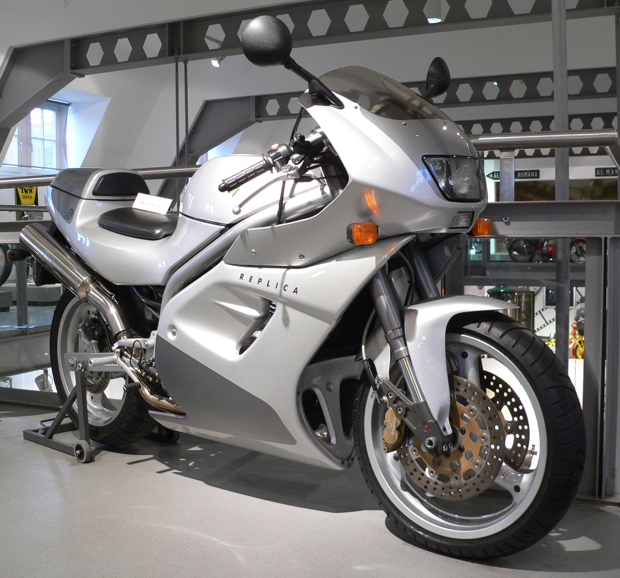 Motorbike "MuZ Skorpion Replica" (1996) at the Deutsches Zweirad- und NSU-Museum (Motor: Yamaha 3 YF, 660 cm³, 50 PS bei 5.500 U/min., 185 km/h)